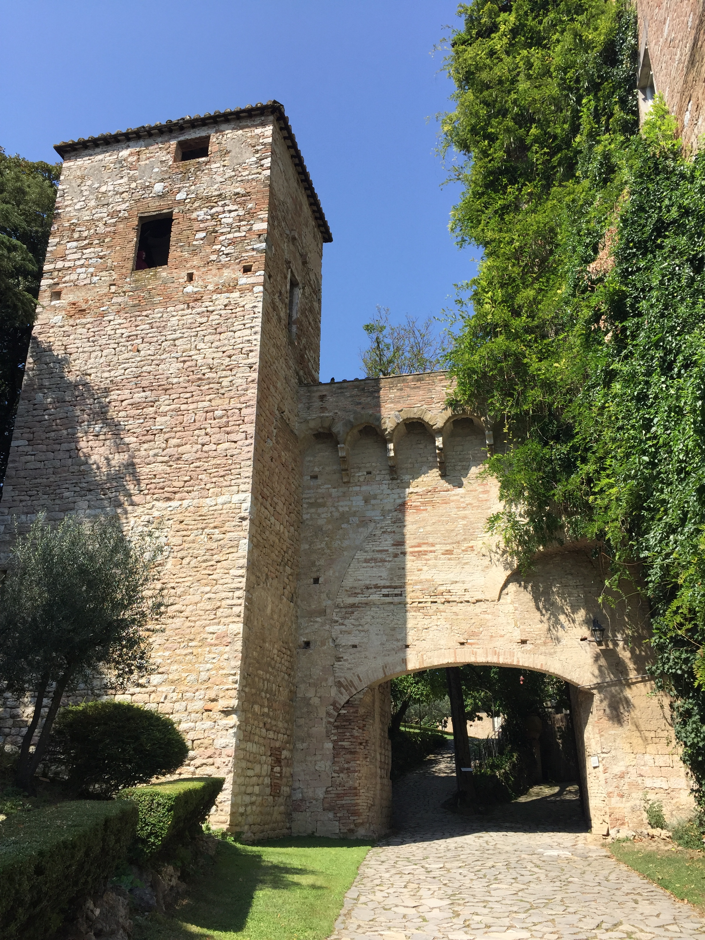 Porta medievale, detta anche Assisana